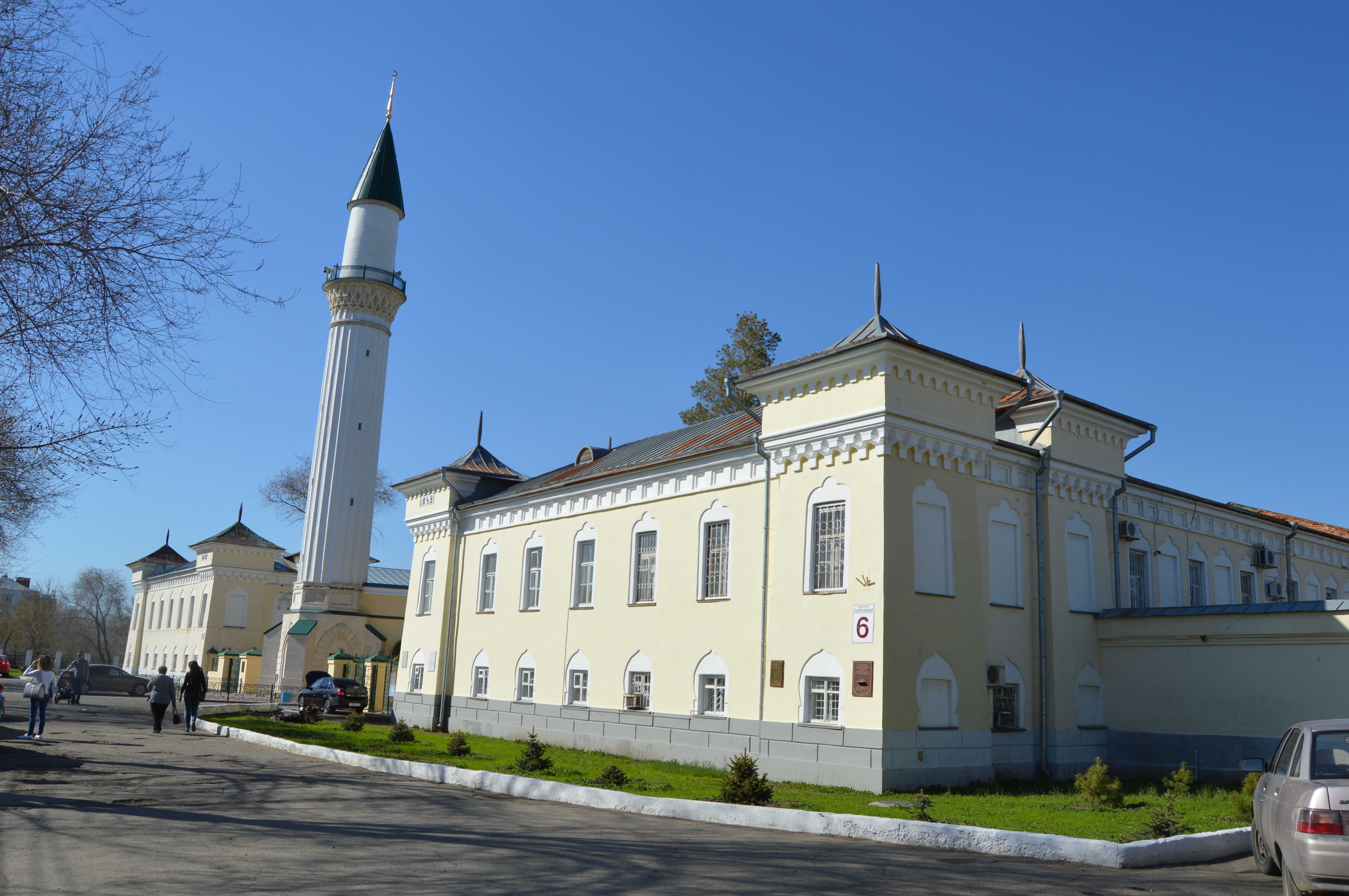 Мечеть "Караван-Сарай" в городе Оренбург.